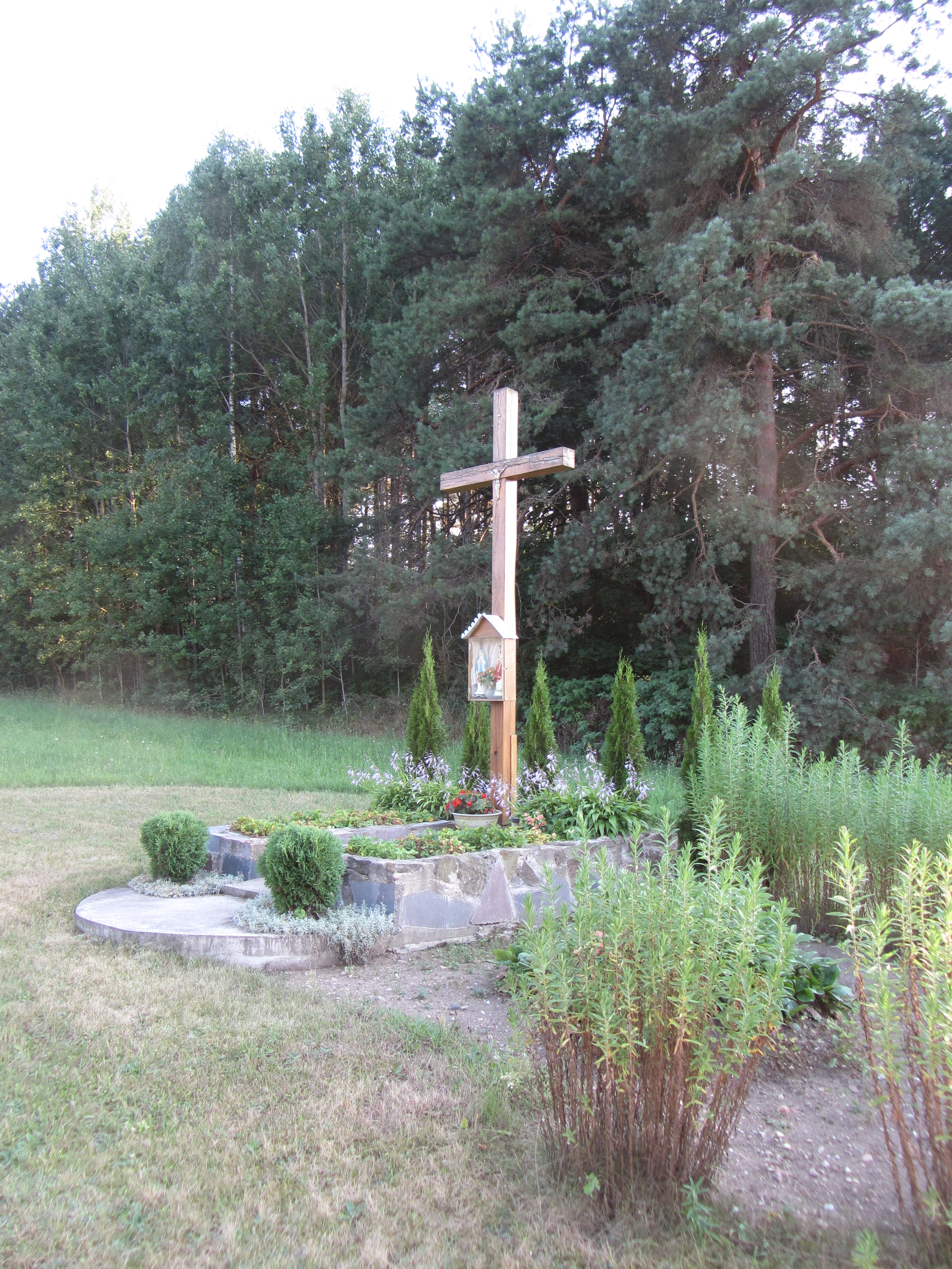 Buikos 17245, Lithuania